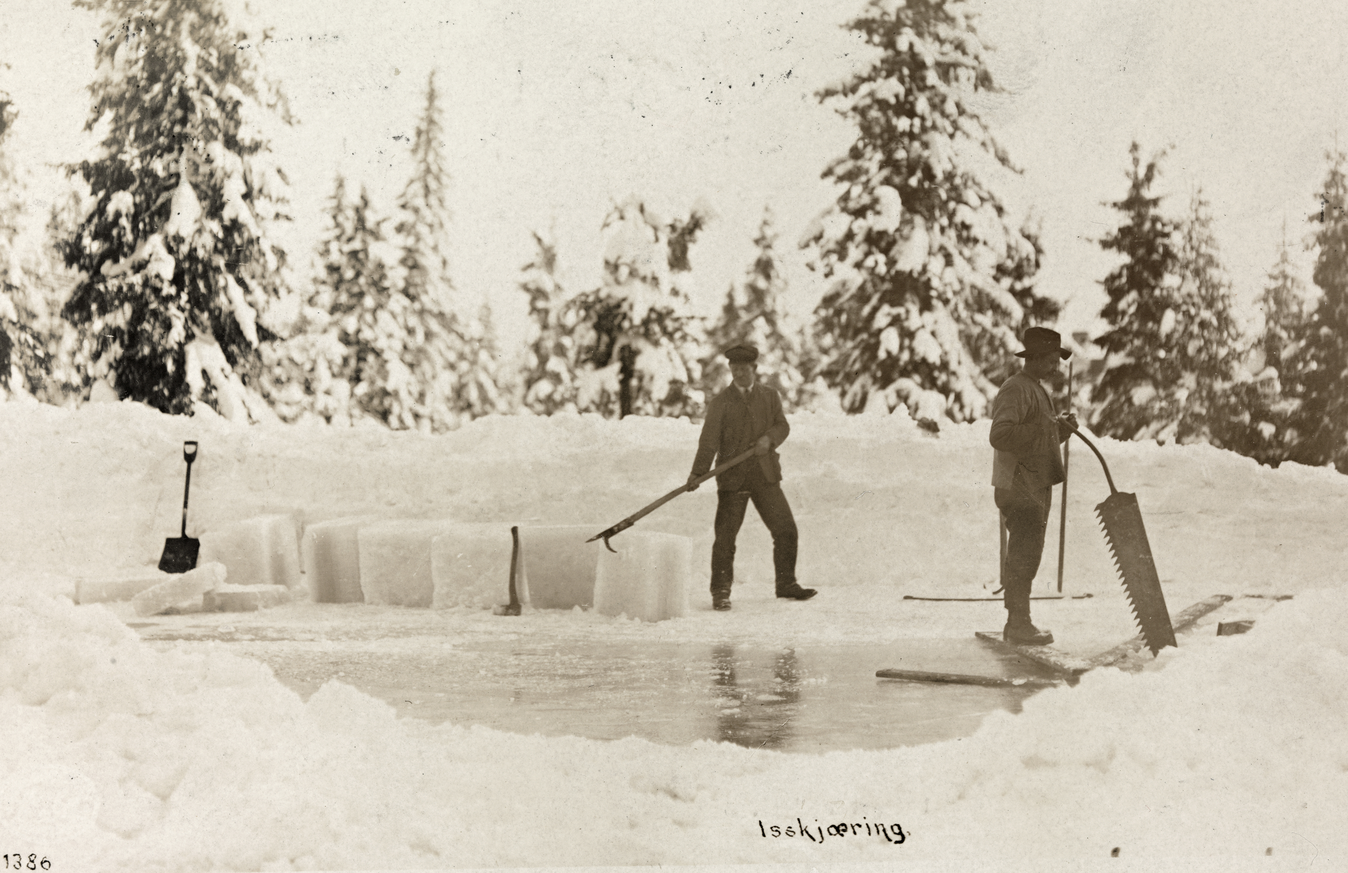 Beskrivelse / Description: Postkort / postcard Dato / Date: ca. 1910 Sted / Place: ukjent / unknown Fotograf / Photographer: ukjent / unknown Utgiver / Publisher: H. Abel's Reproduktionsanstalt Digital kopi av original / Digital copy of original: s/h postkort, sølvgelatin Eier / Owner Institution: Nasjonalbiblioteket / National Library of Norway Lenke / Link: Bildesignatur / Image Number: blds_06554 Om isskjæring på Wikipedia Ice cutting on Wikipedia